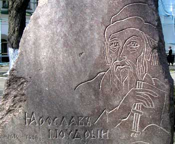 Jaroslaw-Portrait, selbstfotografiert, frei unter GNU FDL